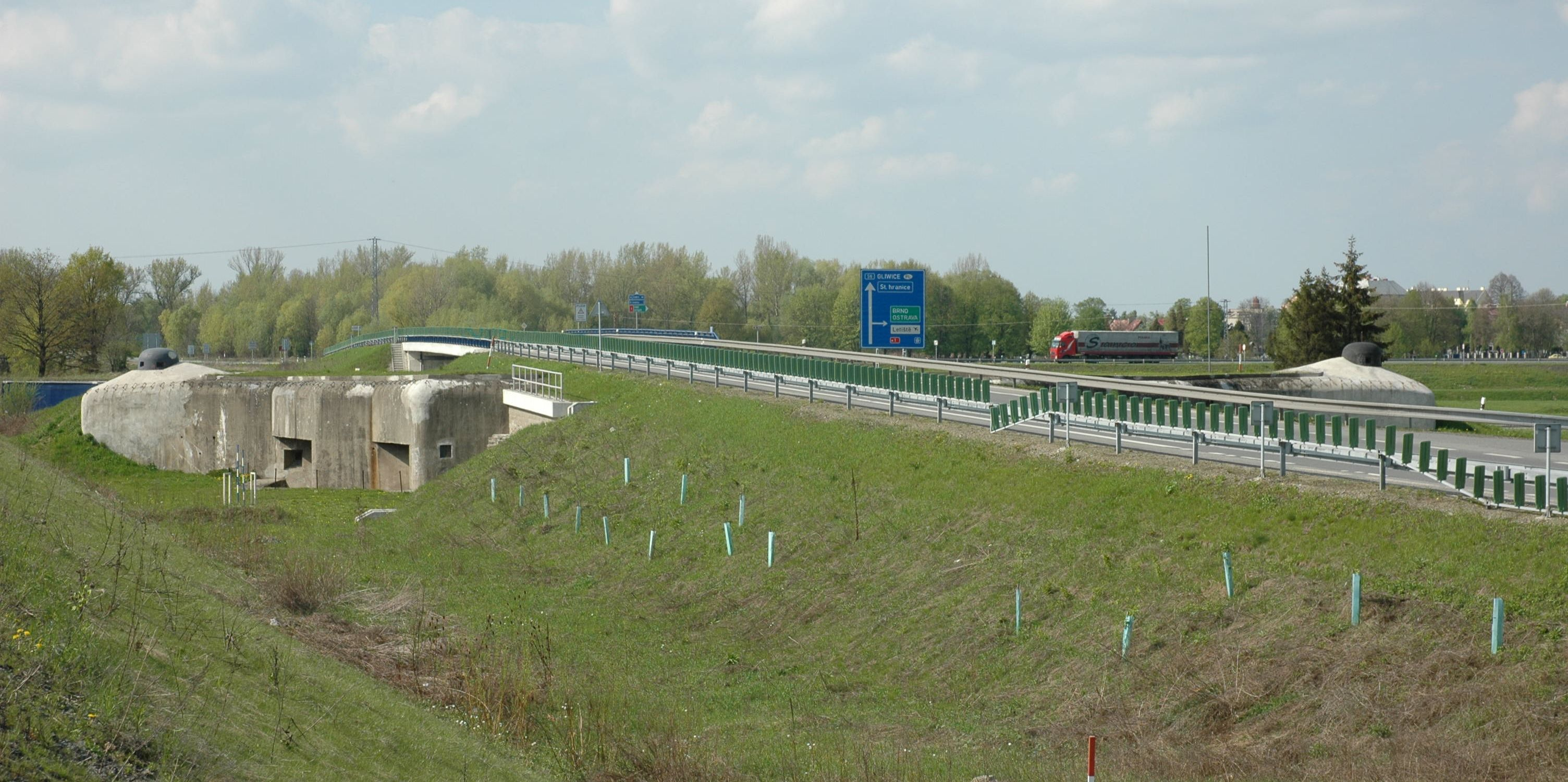 Česky: pěchotní srub MO-S 5 "Na trati", Bohumín